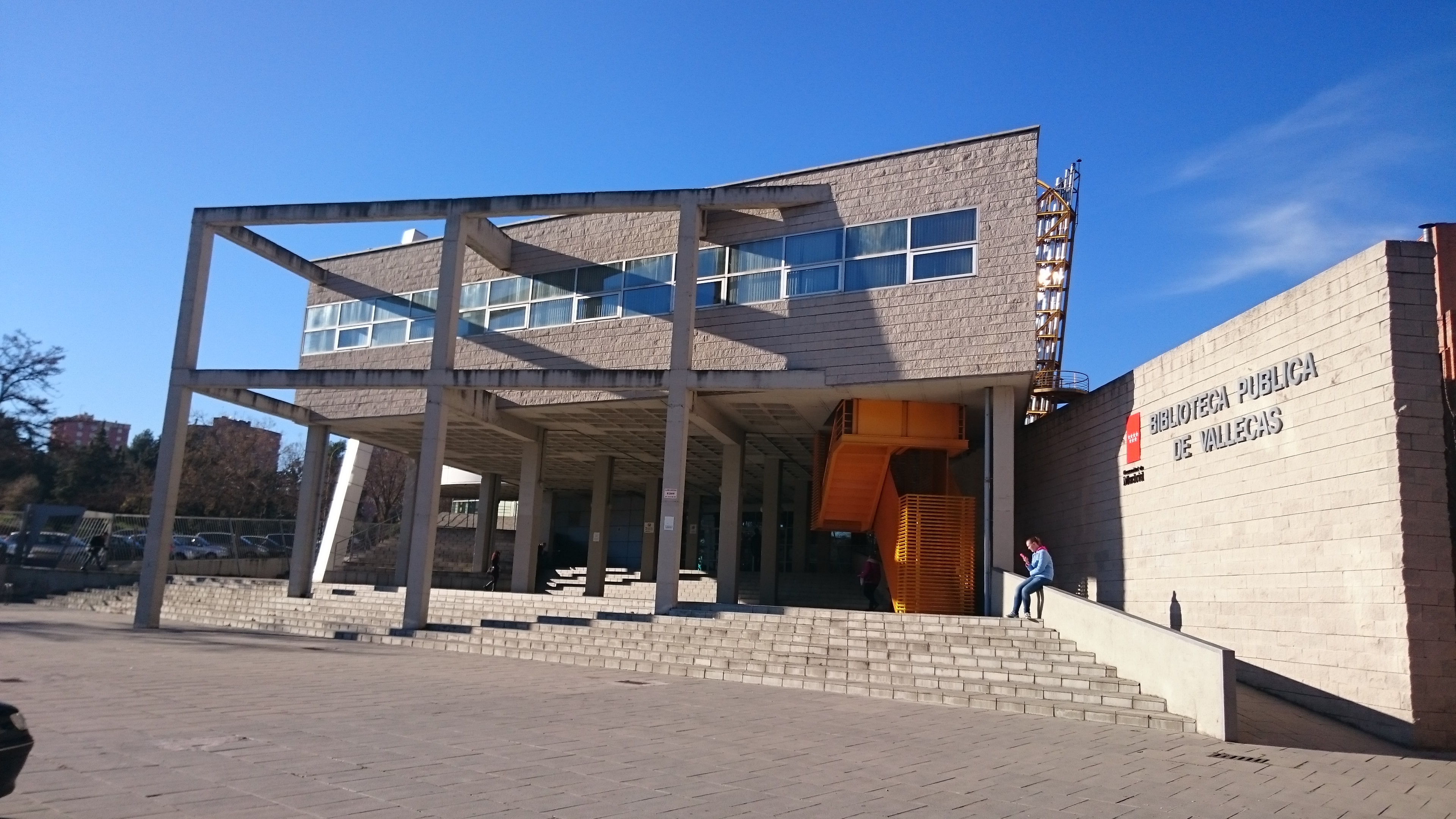 Vista de la Biblioteca Pública Vallecas, en la avenida Rafael Alberti, 36 (28038 Madrid)